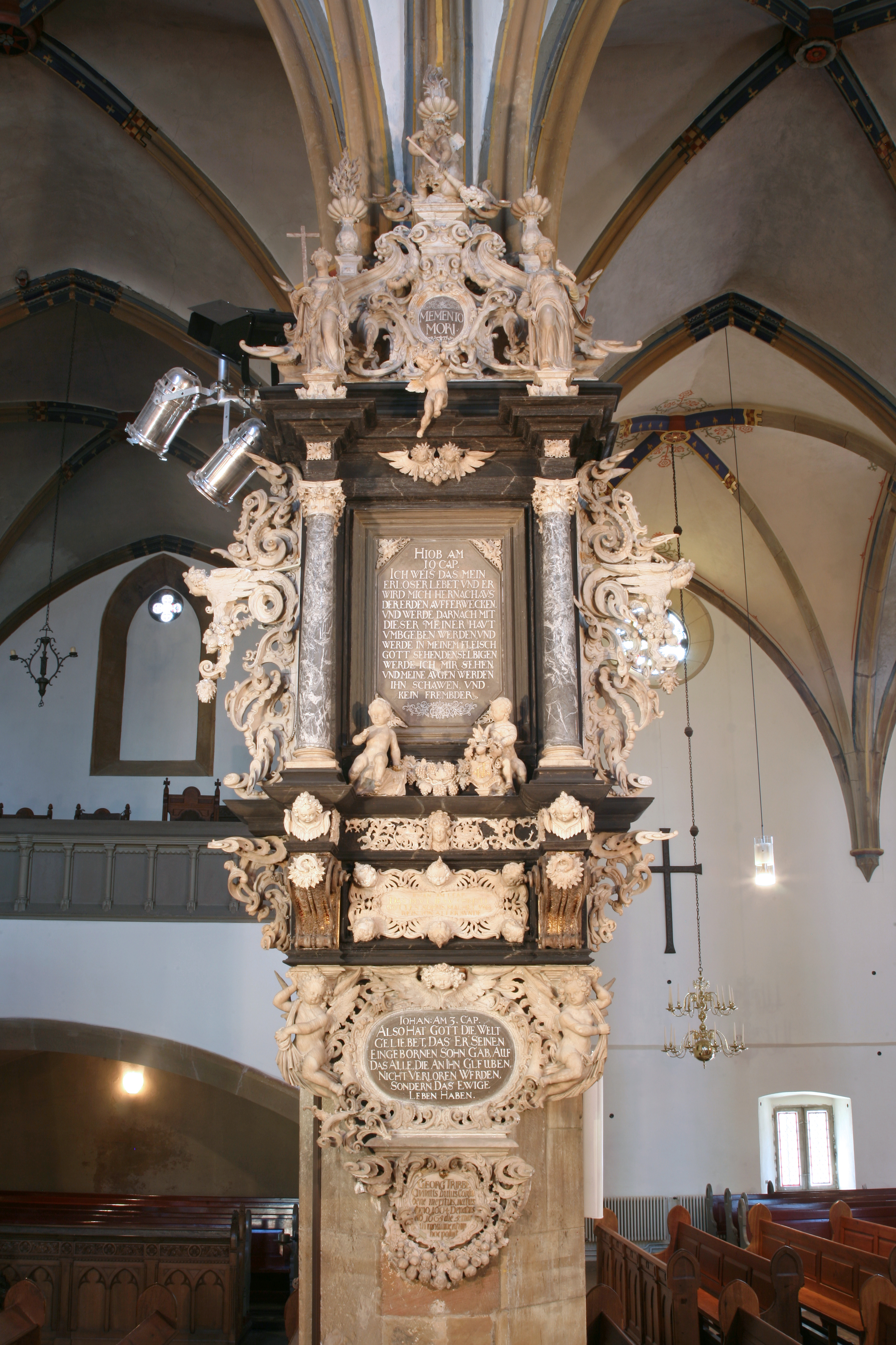 Tribbe Epitaph in der Stiftskirche Obernkirchen